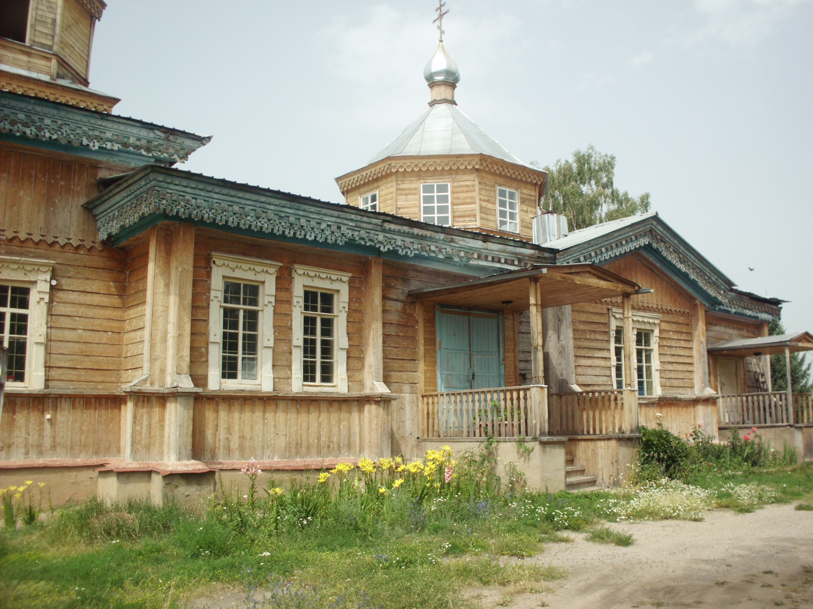 Ак-Сууйская православная церковь